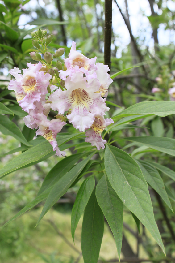 Blüten und Blätter von Chitalpa t.